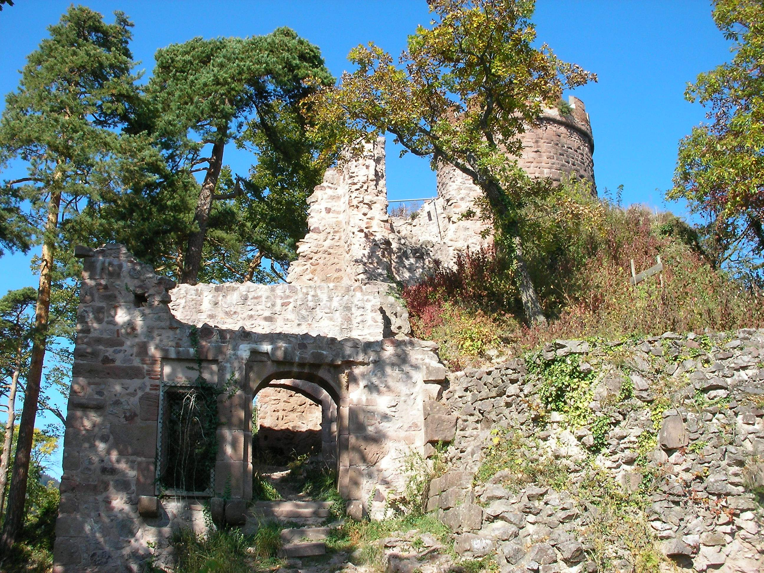 Château du Haut-Ribeaupierre (642 m) à Ribeauvillé (Haut-Rhin, France).